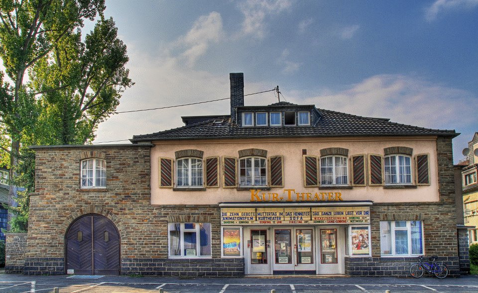 Außenansicht